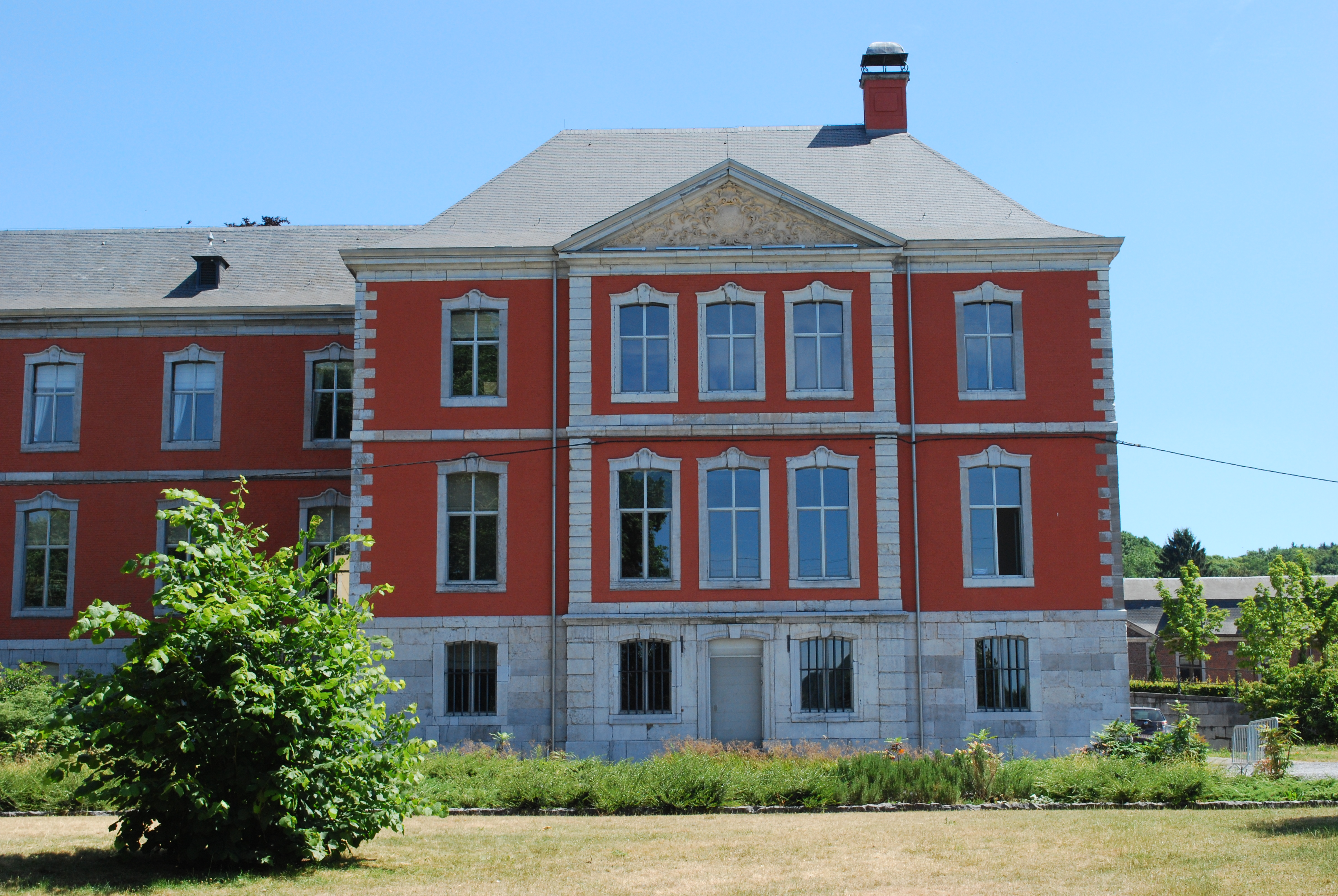 L'ancienne abbaye cistercienne du Val Saint-Lambert à Seraing.